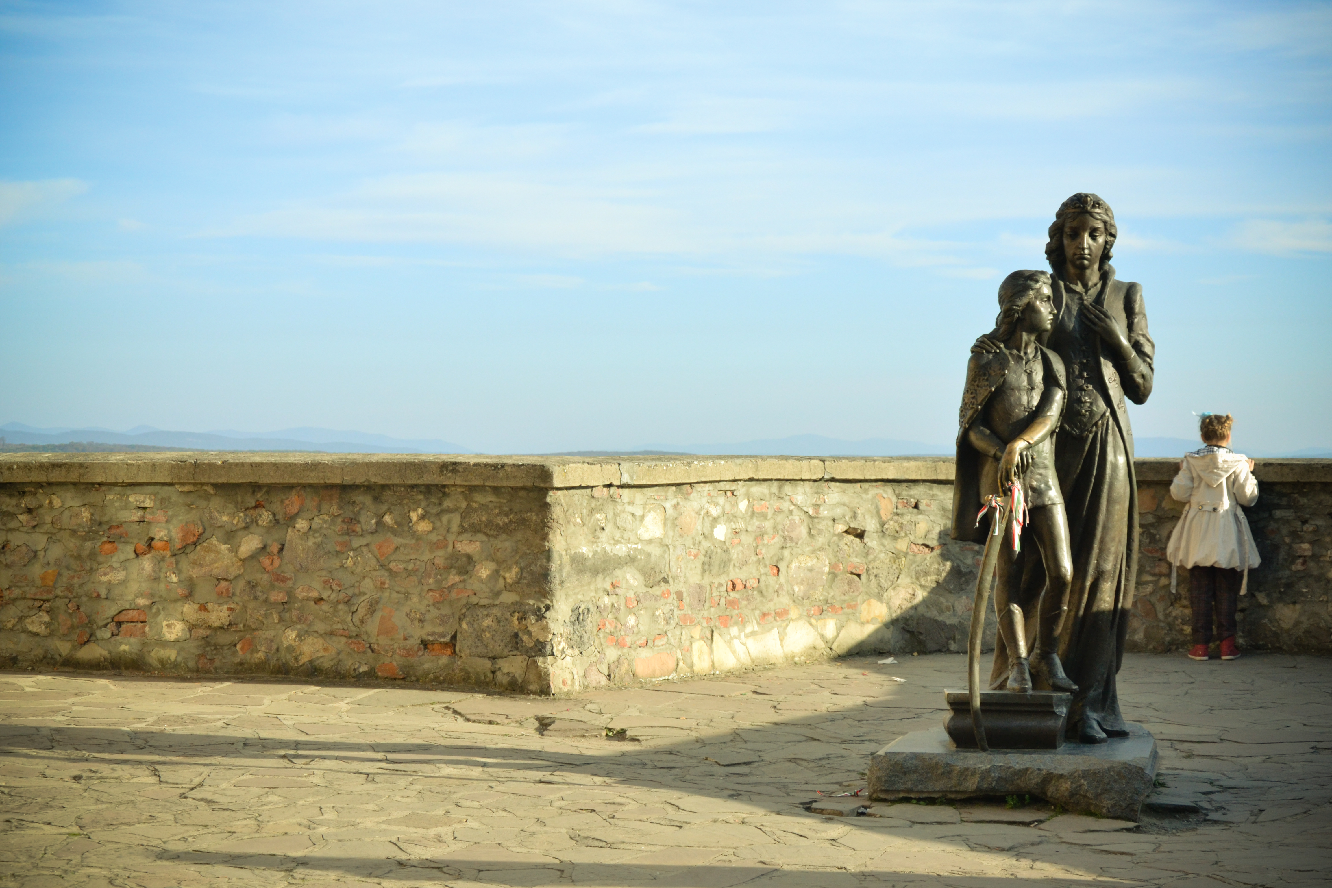 Замок "Паланок" (мур.), Мукачеве, Замкова гора